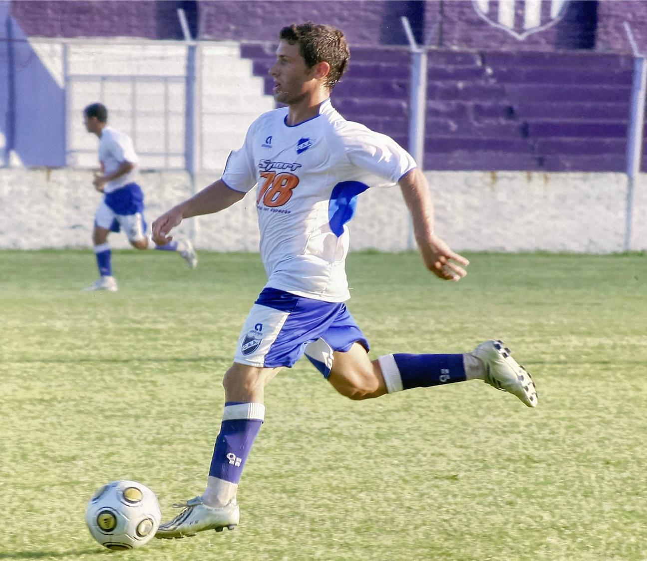 Ramiro Lago nel Ca Argentino 2009